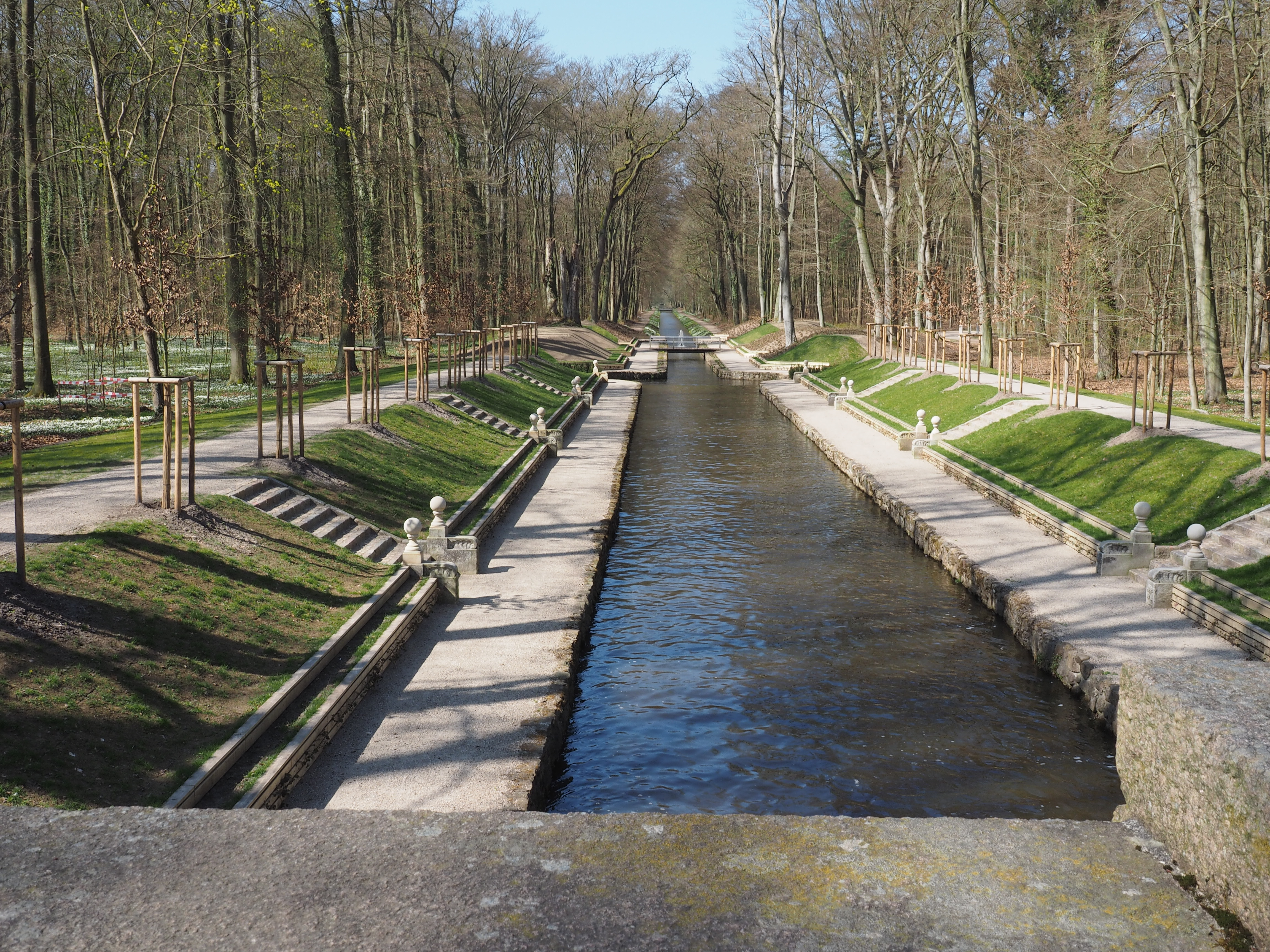 Ludwigsluster Kanal von der Steinernen Brücke im Schlosspark Ludwigslust